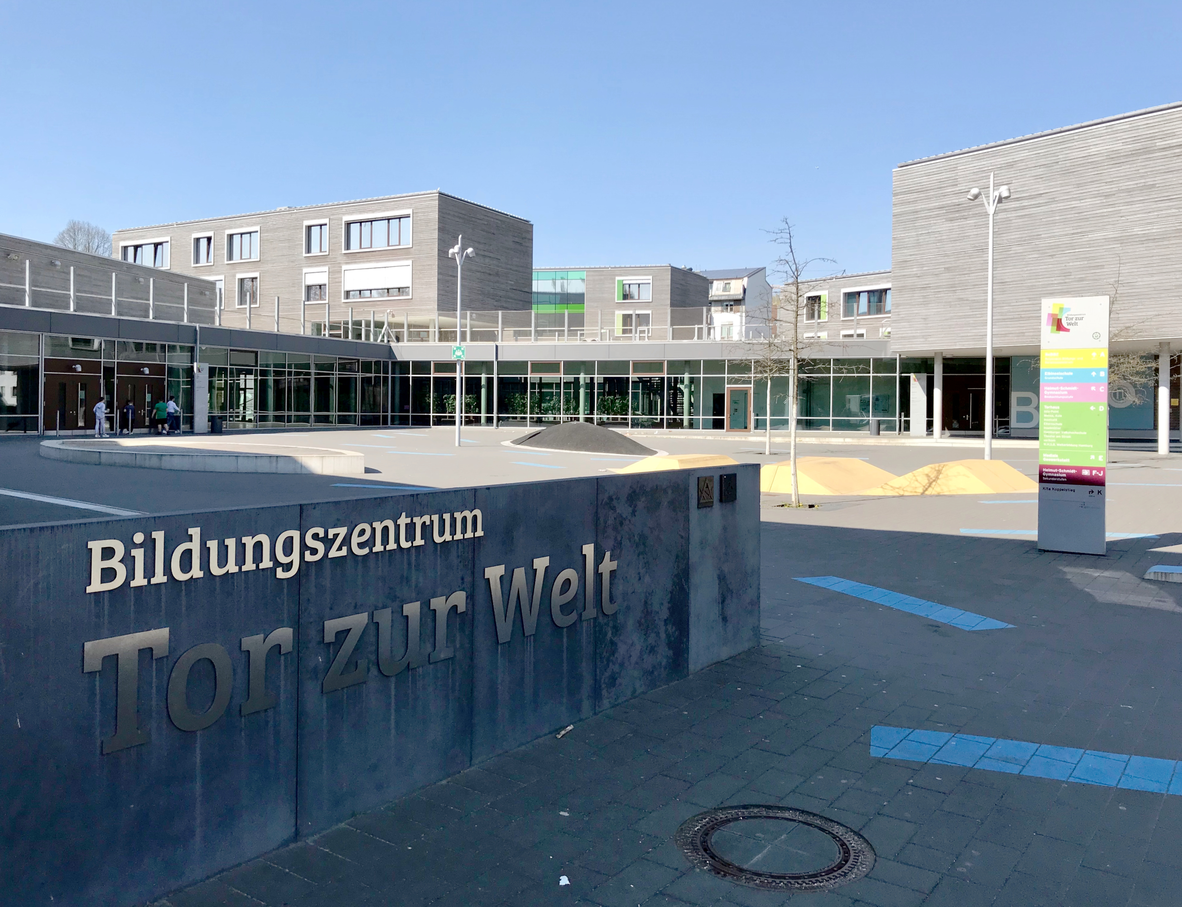 Helmut-Schmidt-Gymnasium in Hamburg, im Hintergrund die Beobachtungsstufe (Gebäude C)